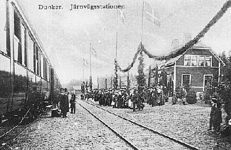 Invigning av Dunkers station 1907